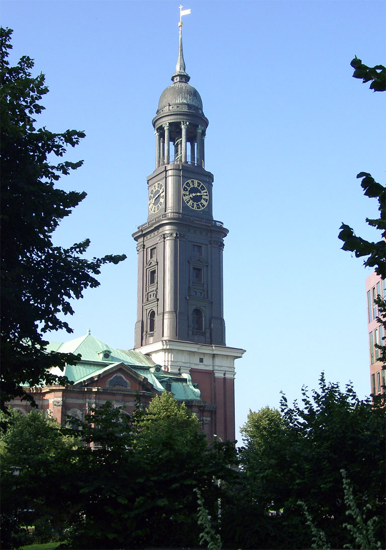 Die Hauptkirche St. Michaelis (auch kurz "Michel" genannt) wurde von 1751 bis 1762 nach Plänen von Johann Leonhard Prey und Ernst Georg Sonnin erbaut. Sie wurde zweimal nach Zerstörungen (1906 und 1943) wieder aufgebaut.